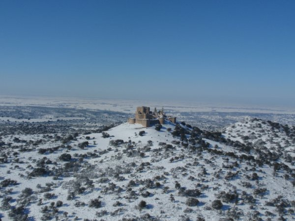 Castillo de Puebla de Almenara tras una nevada